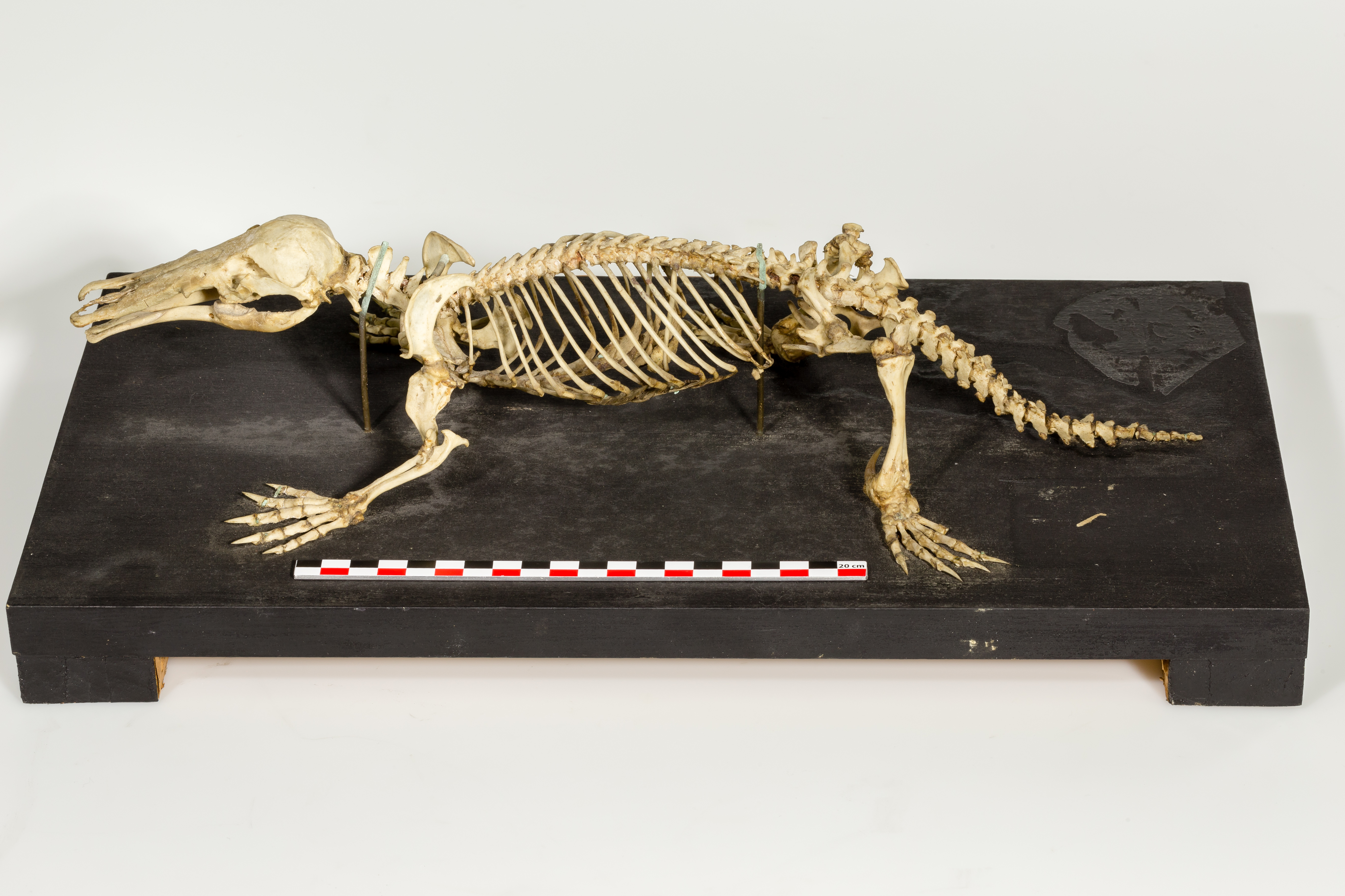 Ornithorynque, squelette, entier, sur socle.